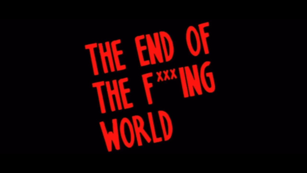 The End of the F***ing World logo